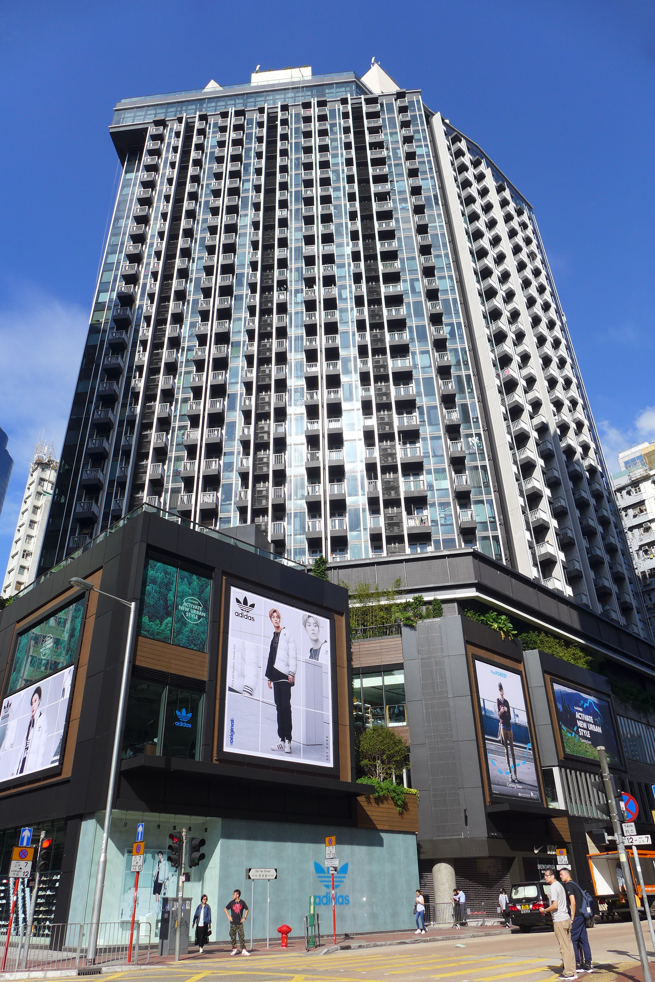 SKYPARK, Mong Kok